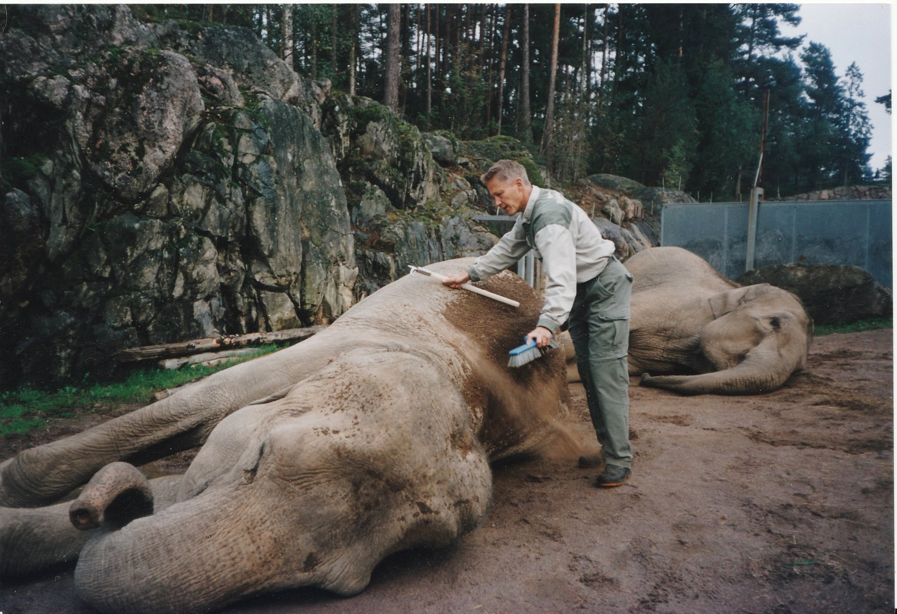 Detta är min f.d.kollega från Skansen, Sven Mellgren som var en mycket dedikerad elefantskötare och här borstar han elefantkorna Putsie och Donkey under sensommaren 2002. Både Putsie och Donkey drabbades av tuberkulos och fick avlivas.